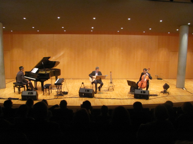 Concert Premis Vallverdú Lleida 2013. Estrena CD Rafa Xambó T'estimo tant. Sonets de Shakespeare